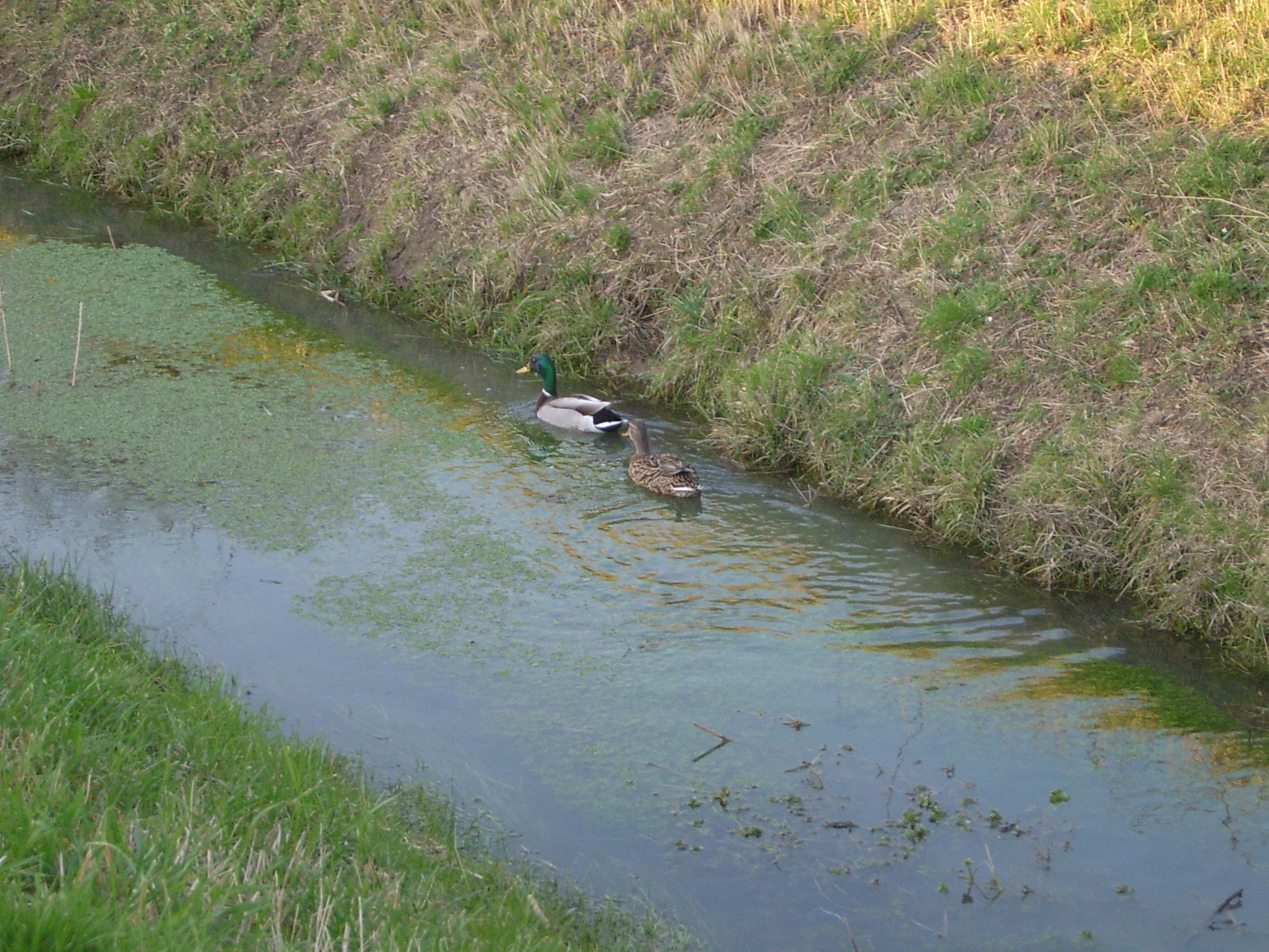 Source : photo personelle prise par Kerlidec